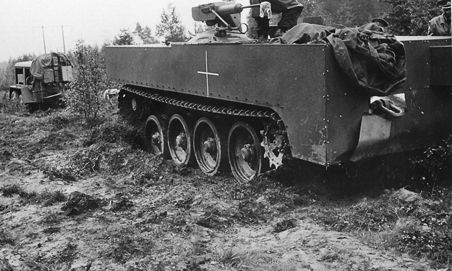 Strv S1-ի փորձարկումները, 1961 թ․ ամառ։